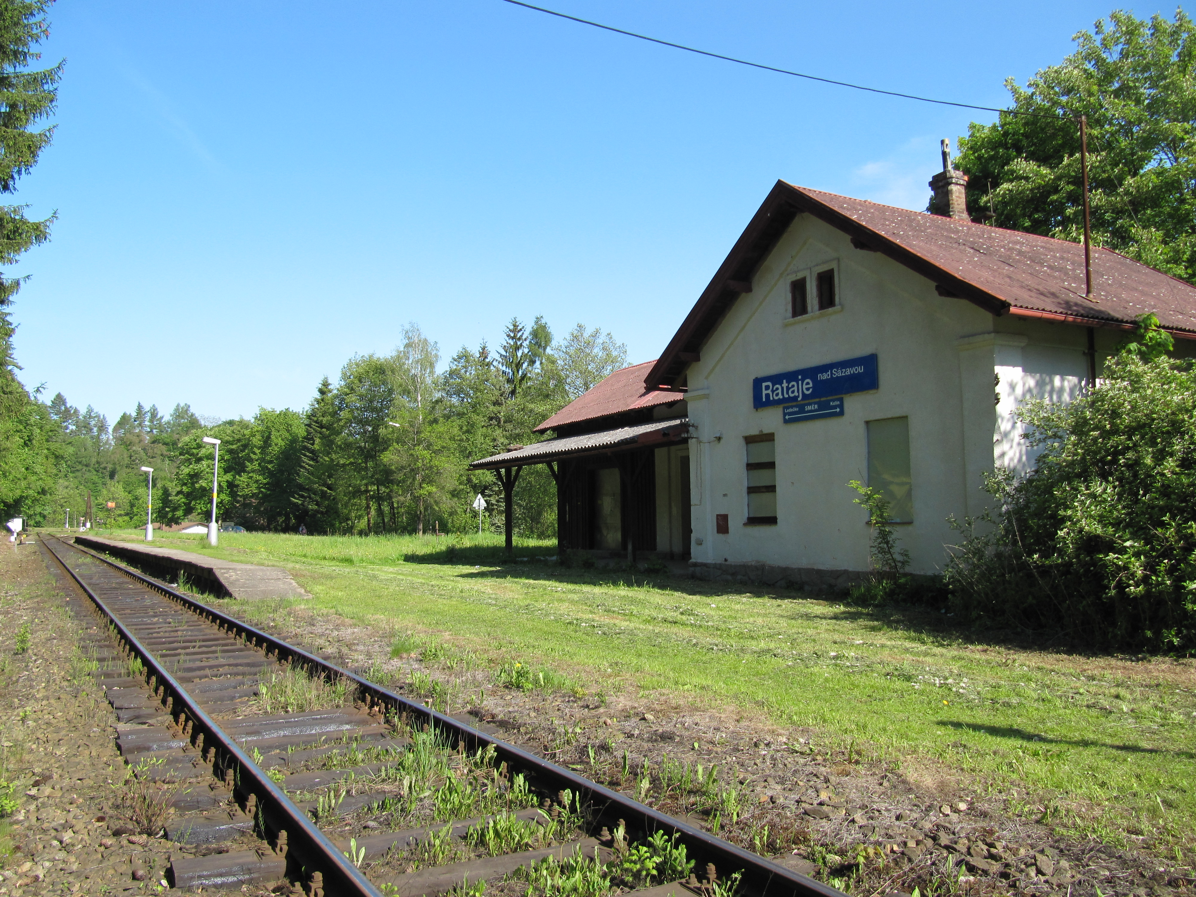 Rataje nad Sázavou